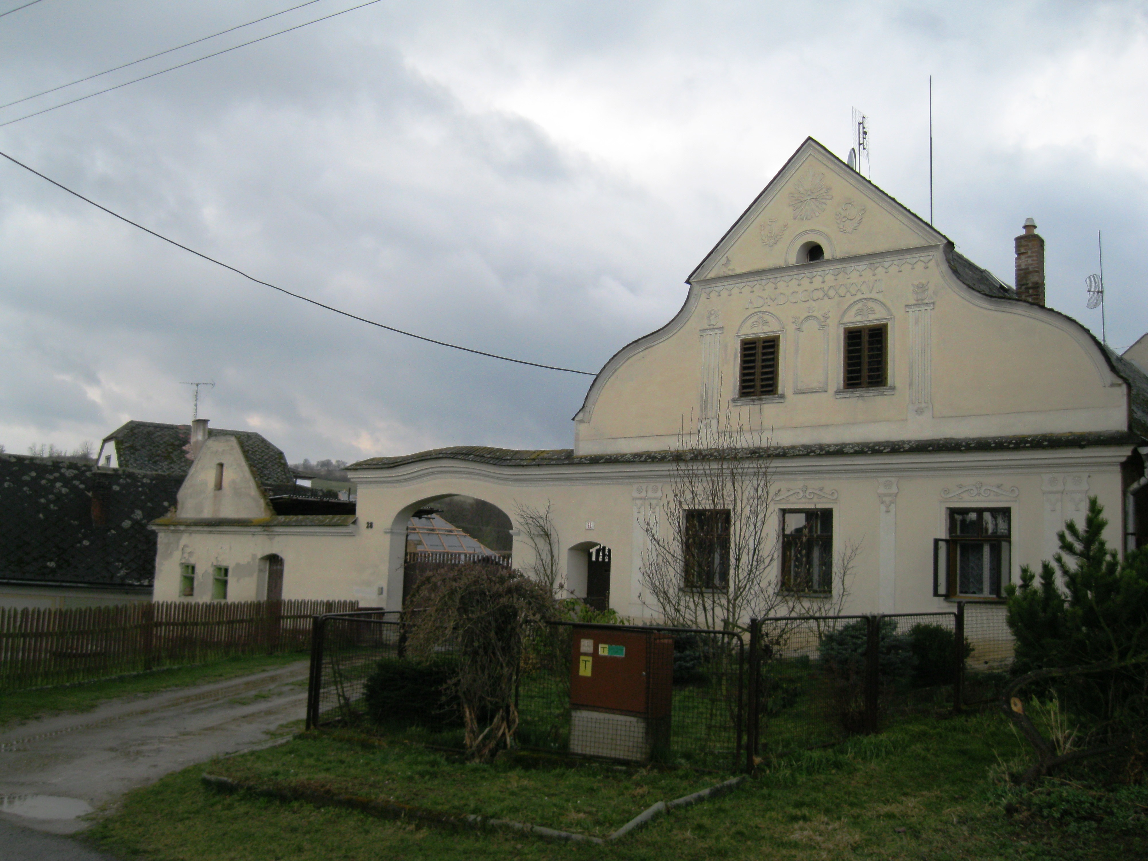 Venkovská usedlost (Křemačov), J část návsi 20, Křemačov